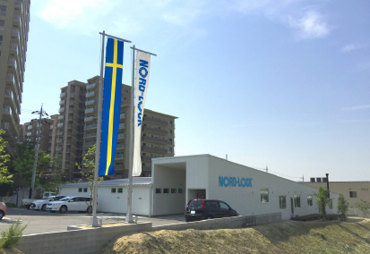 ノルトロックジャパン大阪オフィス